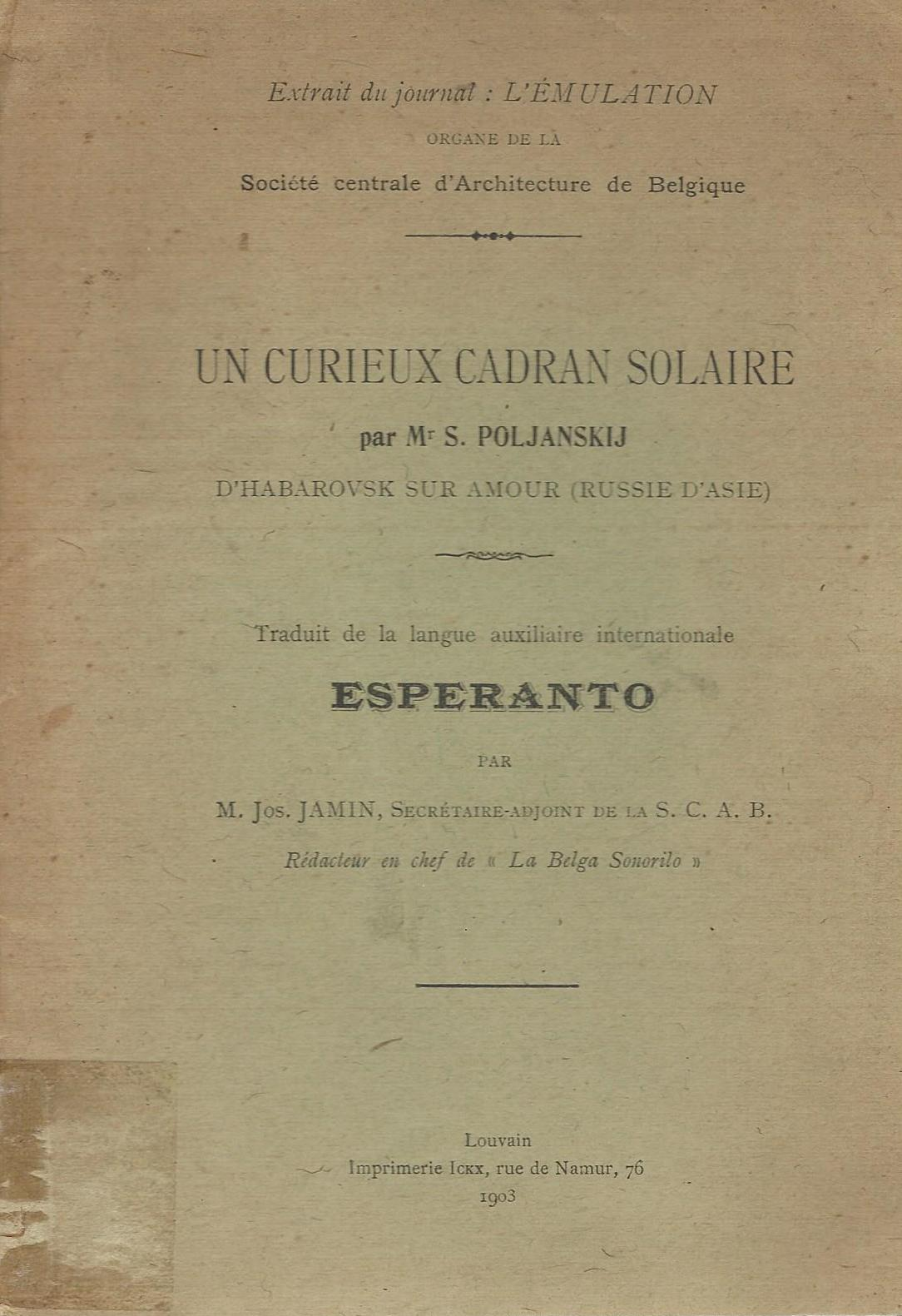 Librokovrilo de "Un Curieux Cadran Solaire",1903